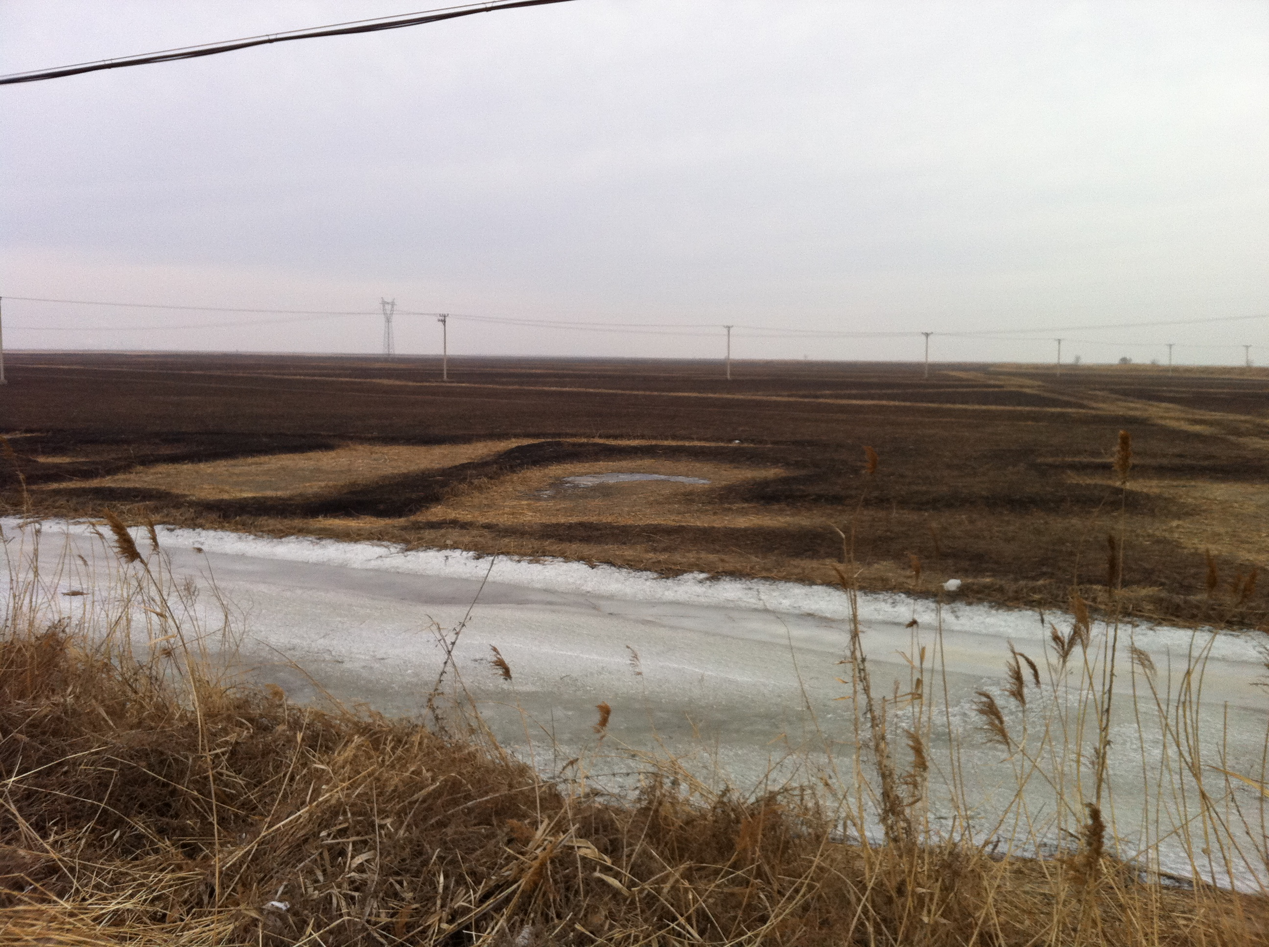 Panshan, Panjin, Liaoning, China